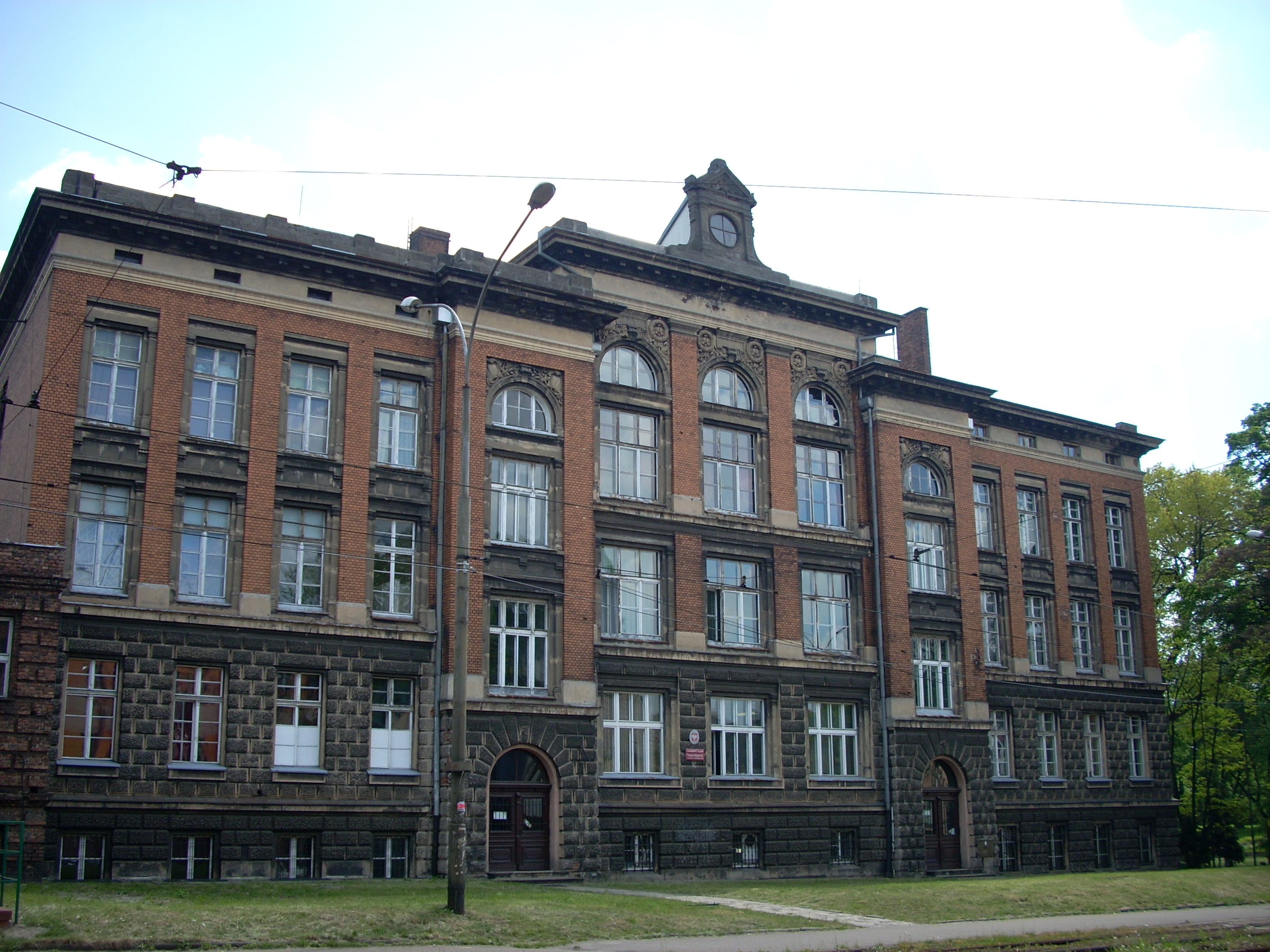 Sosnowiec, ul. Stefana Żeromskiego 3 - gmach dawnego Liceum im. Stanisława Staszica, obecnie Uniwersytet Śląski Wydział Informatyki I Nauki O Materiałach